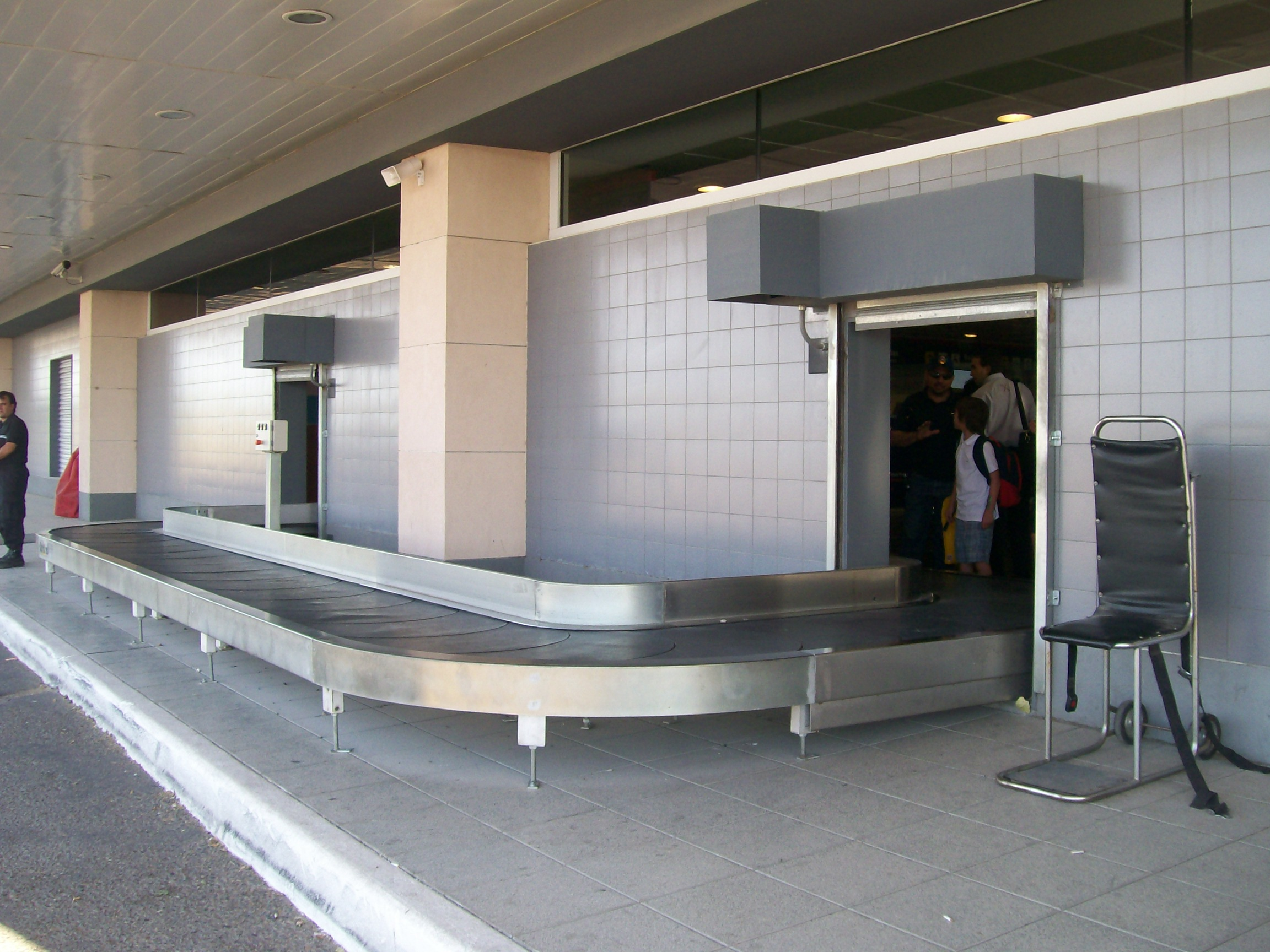 Cinta de equipaje (APT de neuquen)